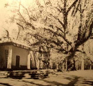 Estancia que perteneció a la familia López de Osornio